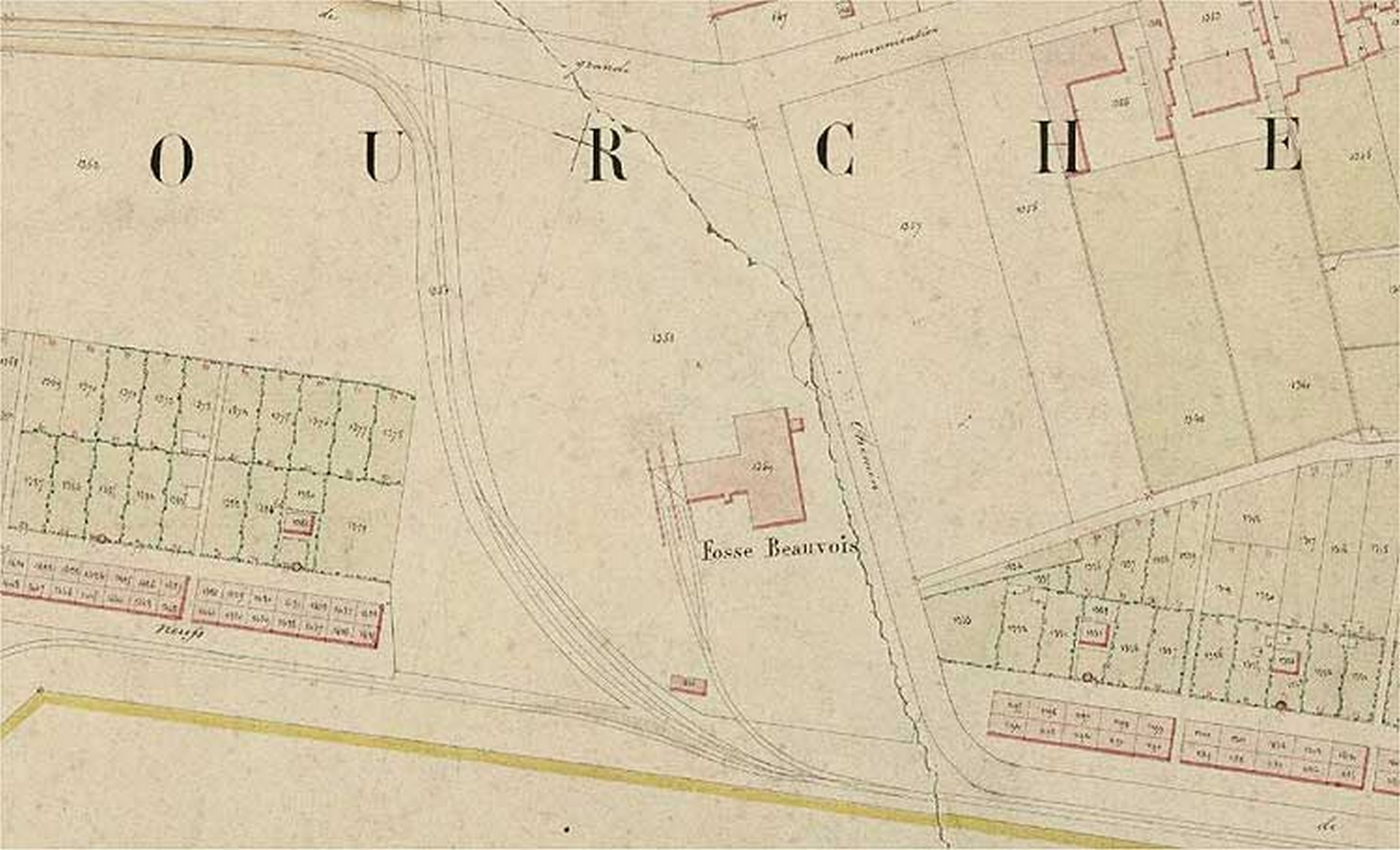 La fosse Beauvois ou n° 2 de la Compagnie des mines de Douchy était un charbonnage constitué d'un seul puits situé à Lourches, Nord, Nord-Pas-de-Calais, France.